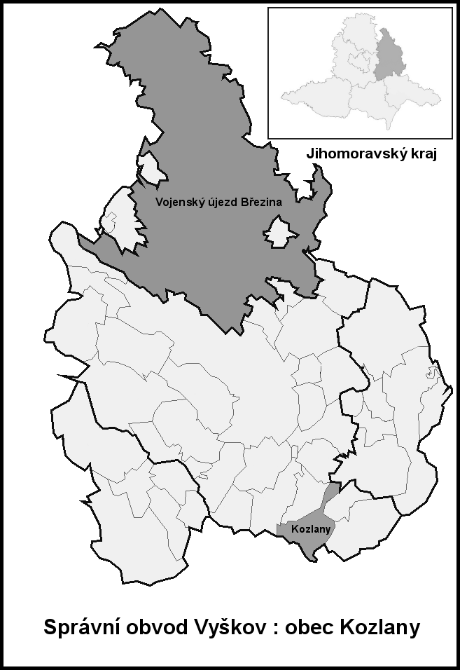 Správní obvod Vyškov : obec Kozlany (Czech republic)